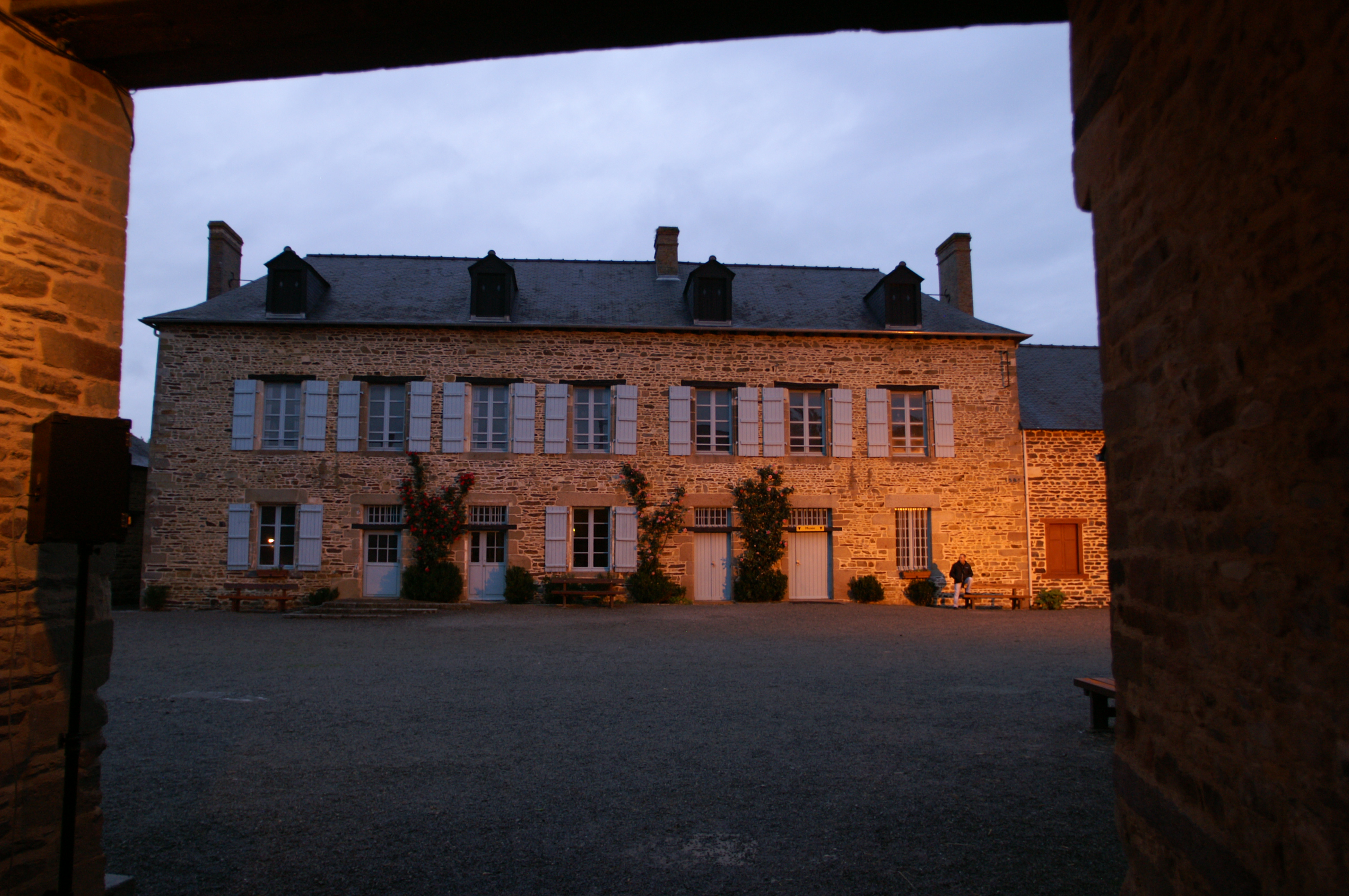 Écomusée du pays de Rennes, le soir de la Nuit des Musées 2012.